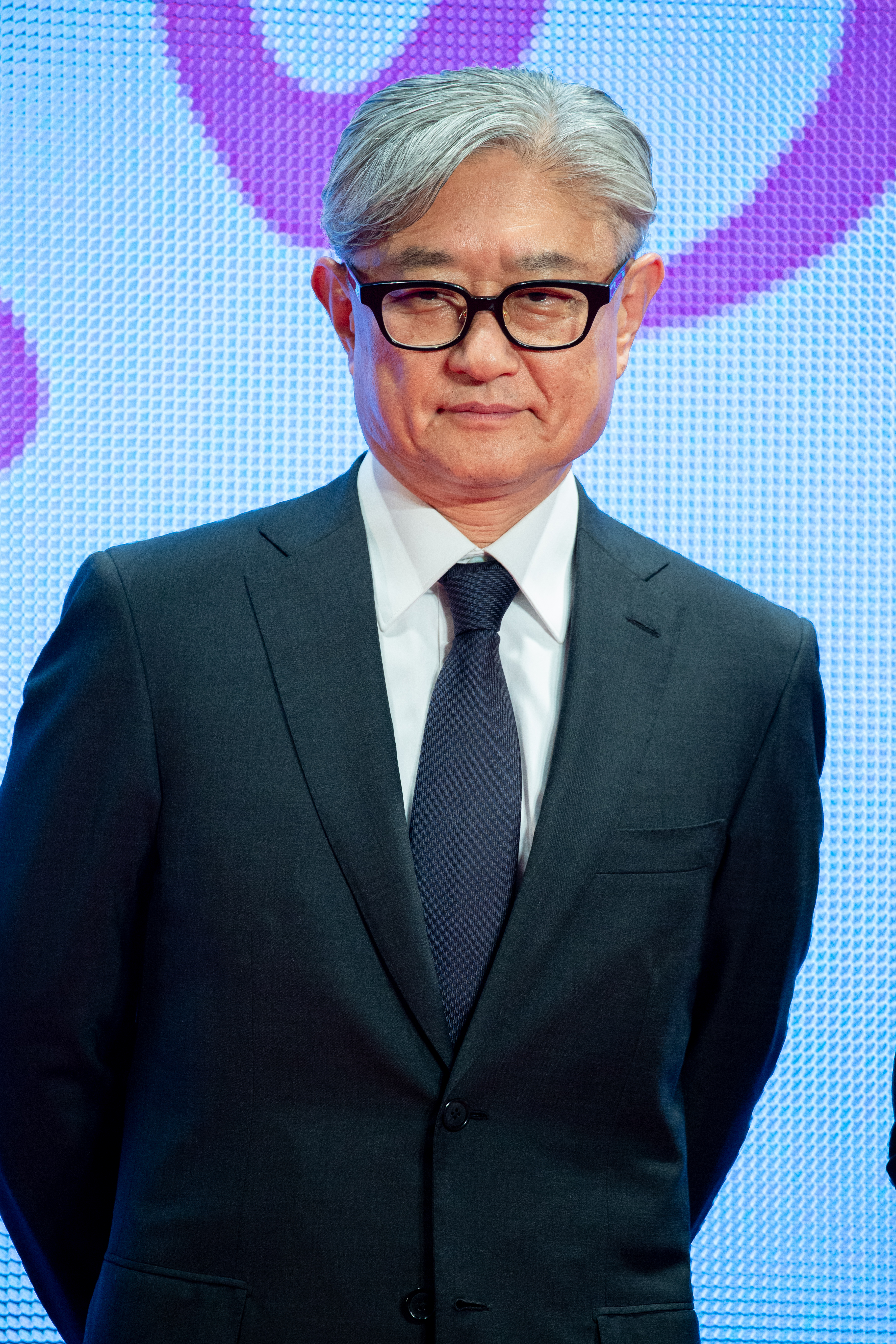 第30回 東京国際映画祭 人魚の眠る家 レッドカーペットイベント 堤幸彦